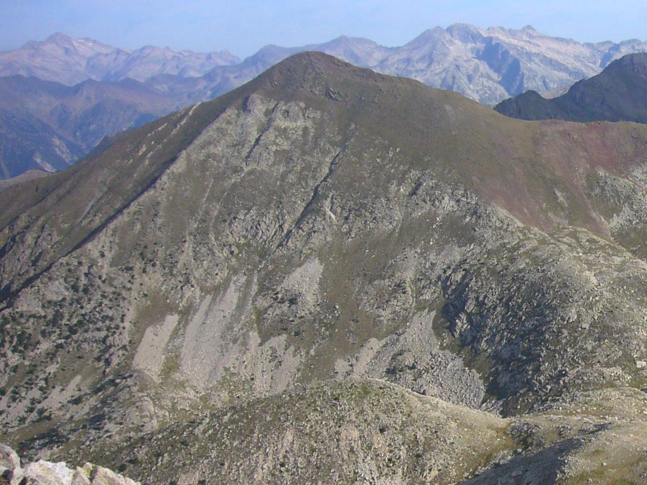 Tuc des Carants vist des de lo Pessó Petit; la Vall de Boí, Alta Ribagorça, Catalunya